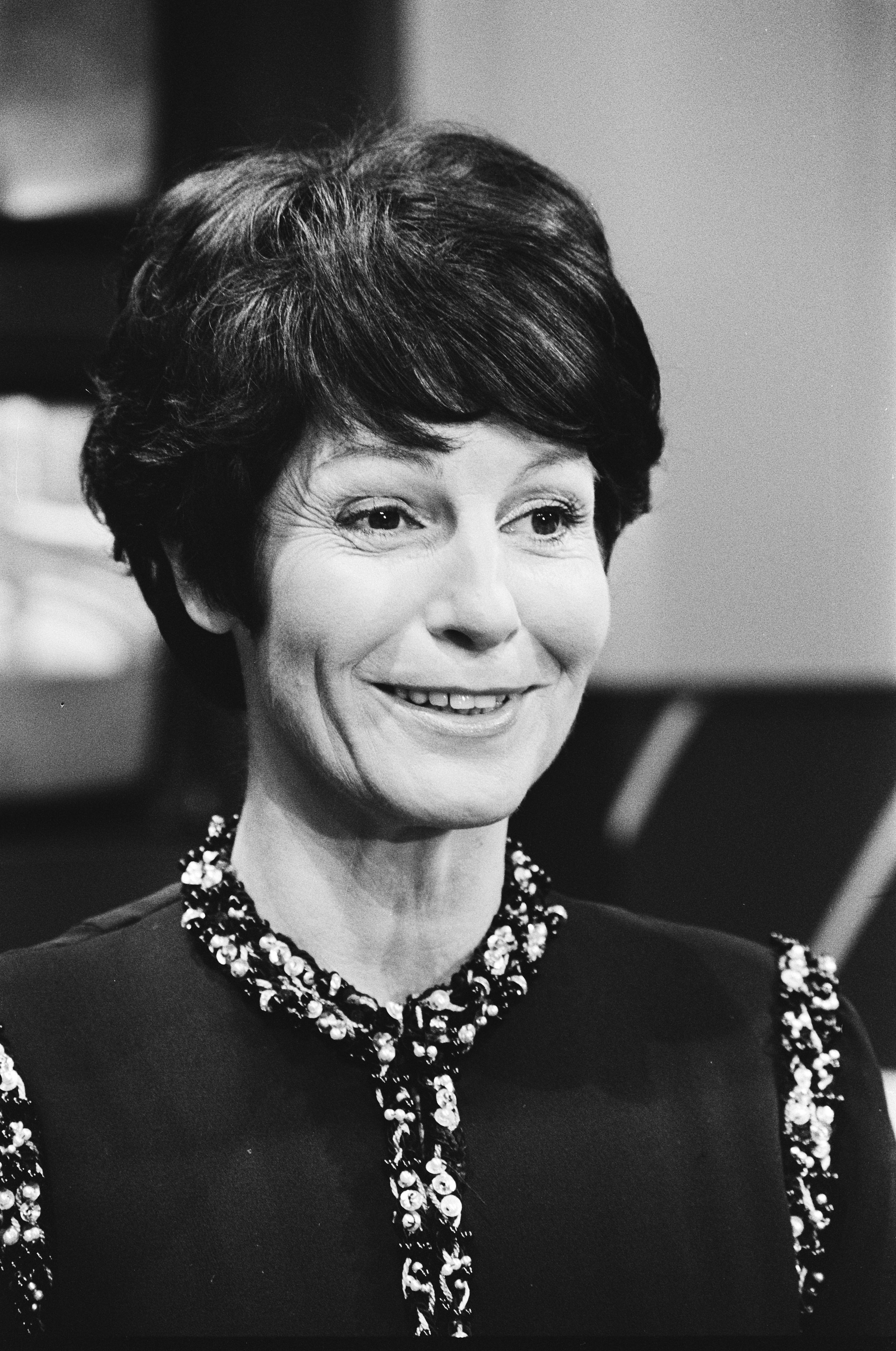 Collectie / Archief : Fotocollectie Anefo Reportage / Serie : Opnamen Europaquiz door de NOS in verband met de Europese verkiezingen Beschrijving : NOS televisieprogramma Europaquiz. Mies Bouwman Datum : 5 juni 1979 Trefwoorden : portretten, programmamakers, verkiezingen, werkopnamen Persoonsnaam : Bouwman, Mies Fotograaf : Suyk, Koen / Anefo, [onbekend] Auteursrechthebbende : Nationaal Archief Materiaalsoort : Negatief (zwart/wit) Nummer archiefinventaris : bekijk toegang 2.24.01.05 Bestanddeelnummer : 930-2994 Reacties Geplaatst door Maaike op 08 juni 2012 - 18:24. NOS televisieprogramma aan de vooravond van de Europese Verkiezingen.